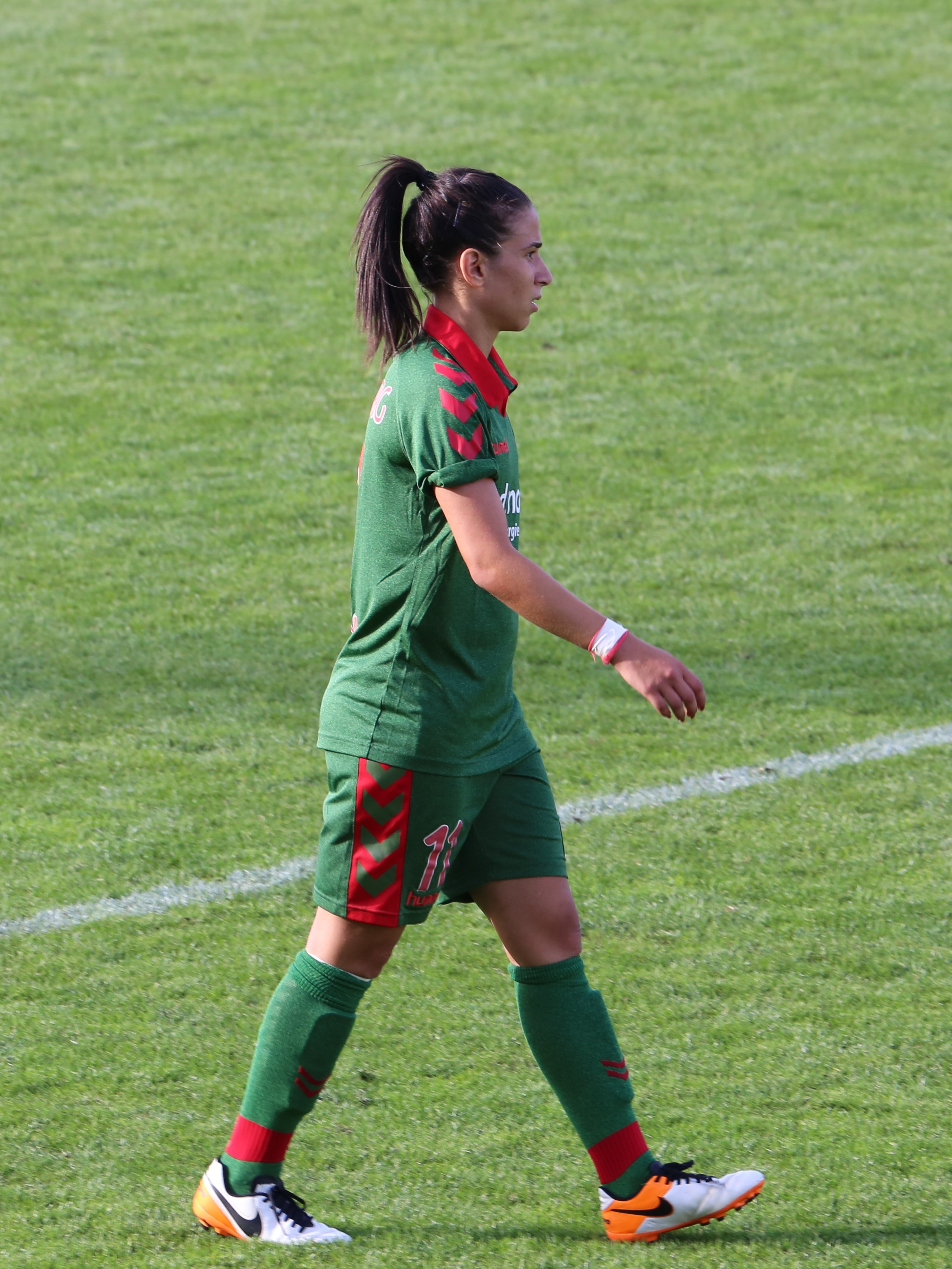 Hasret Kayikci, SC Freiburg, beim Frauen-Bundesliga-Spiel FC Bayern München gegen SC Freiburg am 3. September 2016 im Stadion an der Grünwalder Straße (Ergebnis war 1:1).